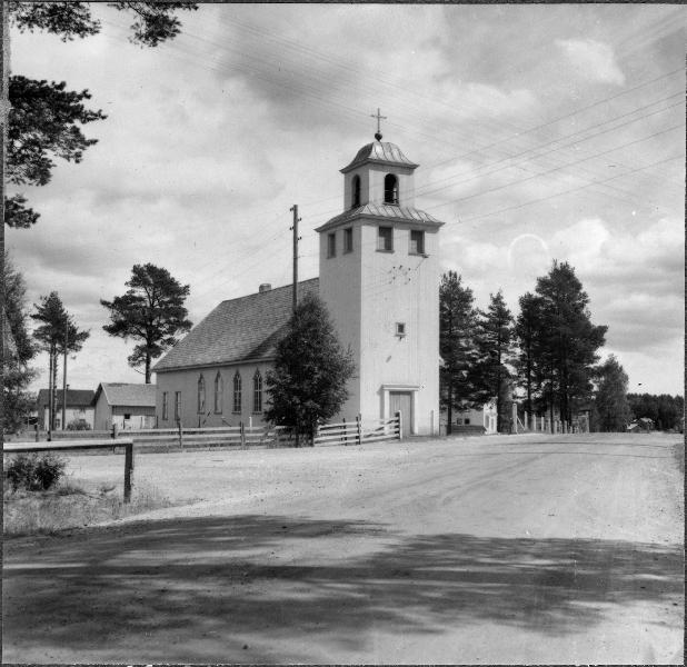 Kyrkan från nordväst Kategori: (01) ExteriörerKyrkan från nordväst.